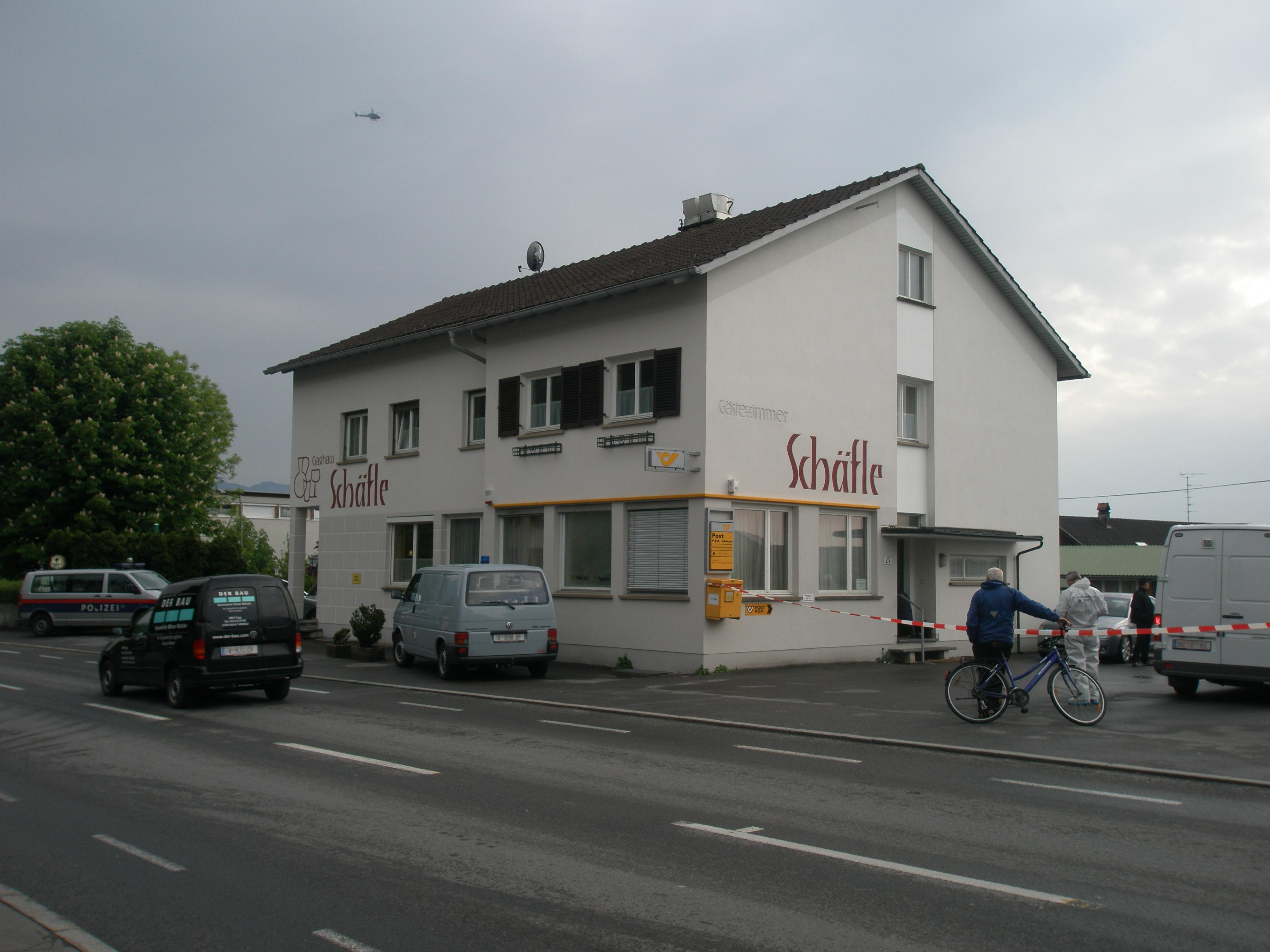 Postüberfall in Haselstauden